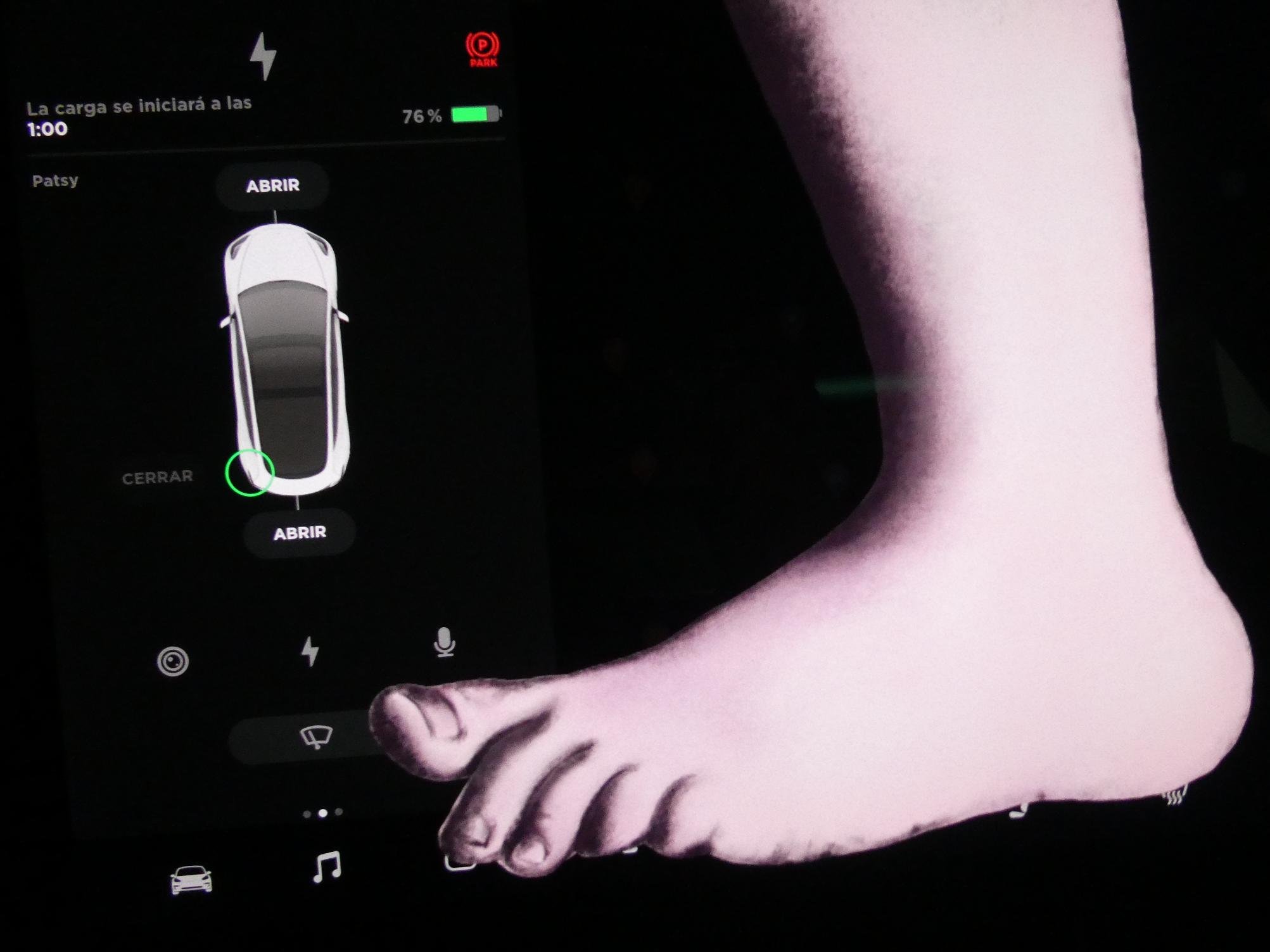 Huevo de Pascua en vehículos Tesla del pie de Cupido de Monty Python. Si se cambia el nombre del vehículo a Patsy, Rabbit of Caerbannog, Mr. Creosote, Biggus Dickus o Unladen Swallow aparece el pie de Cupido y suena un pedo en referencia a Monty Python